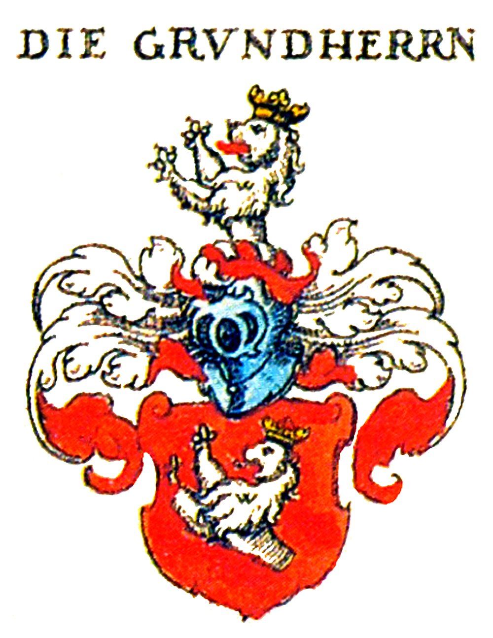 Wappen der Nürnberger Patrizierfamilie Grundherr von Altenthann und Weiherhaus (von Grundherr zu Altenthann und Weyherhaus)